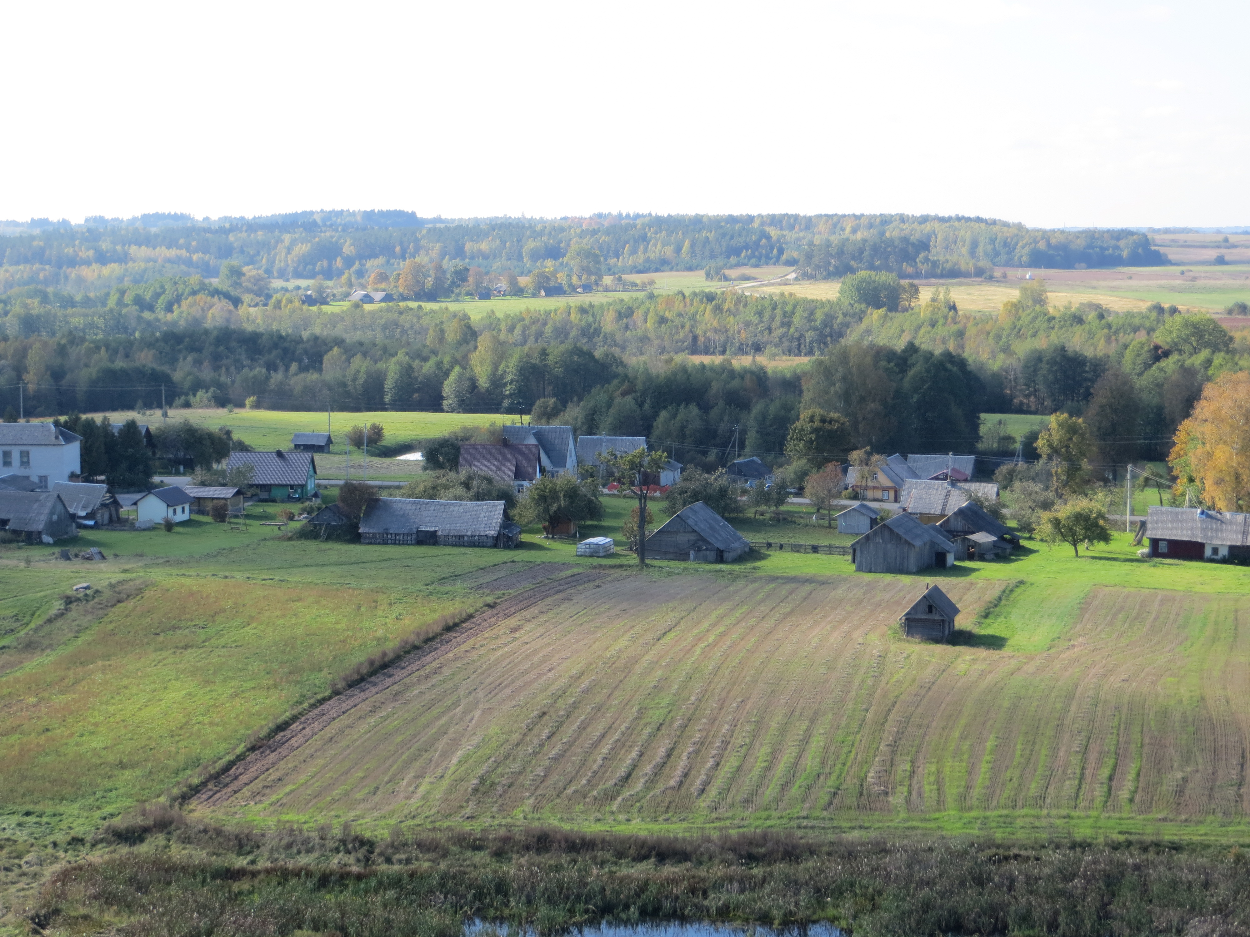 Kryčelės 18101, Lithuania